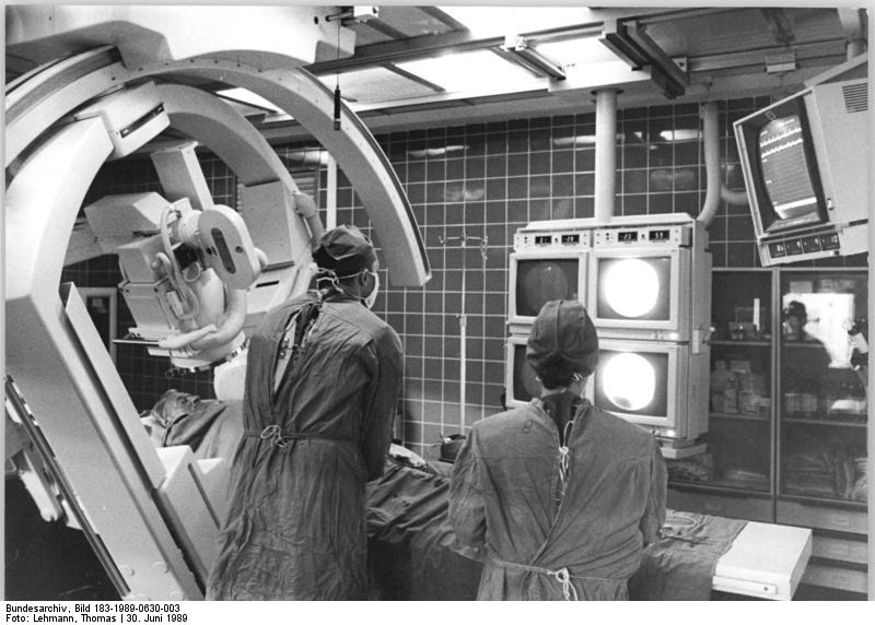 Halle, Universitätsklinik, Herzdiagnose ADN-ZB Lehmann 30.6.89 Halle: Herzdiagnose- Verbesserte Möglichkeiten der Herzdiagnostik bietet ein neuer Herzkatheter-Kardangiographie-Arbeitsplatz im Klinikum Kröllwitz der Martin-Luther-Universität Halle. Während ein kontrastmittelgefüllter Katheder bis zum Herzinneren des Patienten geschoben wird, verfolgen Dr. Eckhard Meyer und Schwester Gabriele Busch den Eingriff am Monitor. Gleichzeitig entstehen Röntgen- und Filmaufzeichnungen. - siehe auch 1989-0530-2 N. Auf Grundlage der exakten Untersuchungsergebnisse kann dann entschieden werden, ob eine Operation nötig ist oder die Erkrankung medikamentös behandelt wird. Das Klinikum ist eines von sechs Zentren der DDR zur spezialisierten Betreuung von Herz-Kreislauf-Patienten.